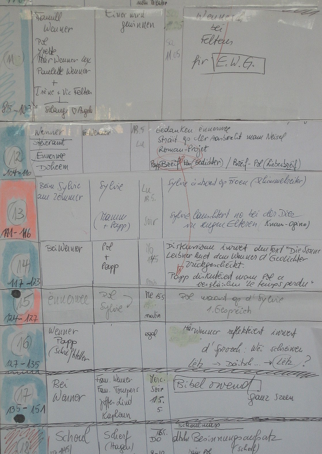 Dem Jhemp Hoscheit säi Plang vum Opbau vu sengem Roman Aacht Deeg an der Woch (Ausschnëtt).